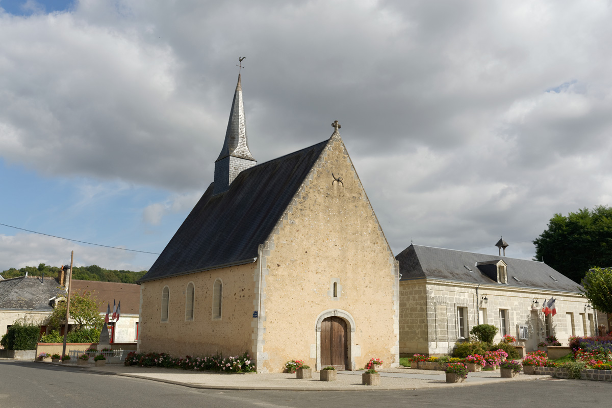 Église Notre-Dame de Tréhet .